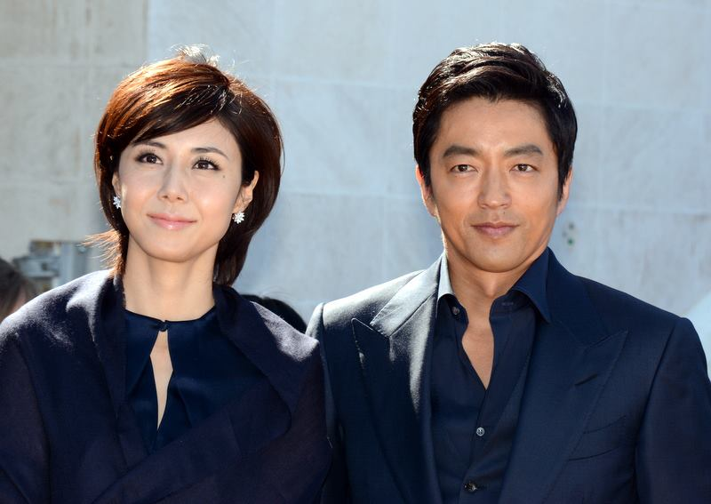 Nanako Matshushima Takao Osawa au festival de Cannes.中文（台灣）: 電影《十億追殺令》演員松嶋菜菜子（左）與大澤隆夫（右）出席2013年第66屆坎城影展。